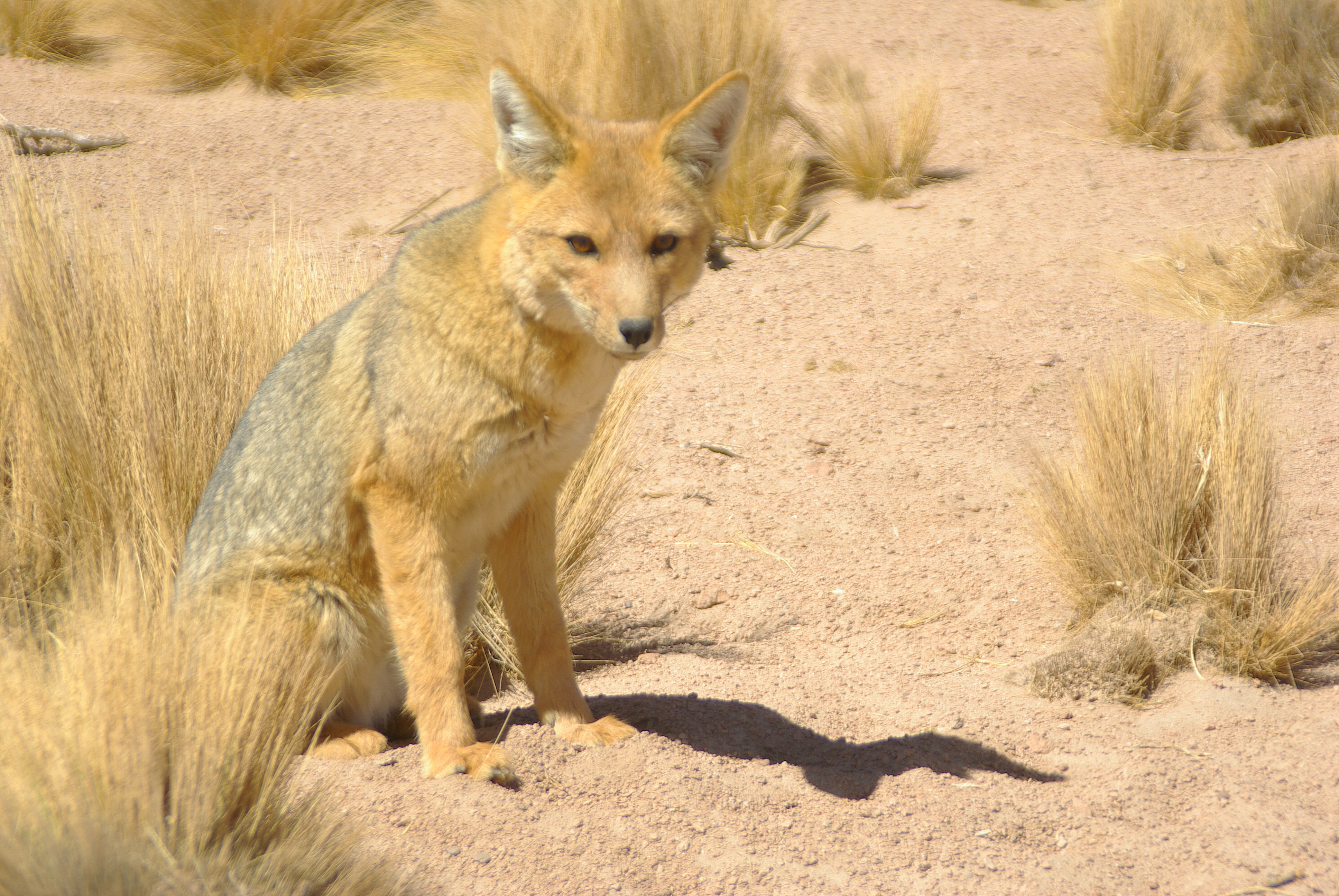 Culpeo, camino de Socaire a laguna Chaxa